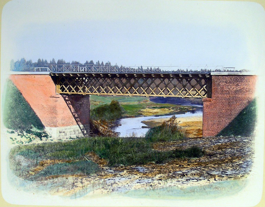 Беларуская (тарашкевіца): Лёзна (Lozna), мост цераз раку Мошну (Mošna)